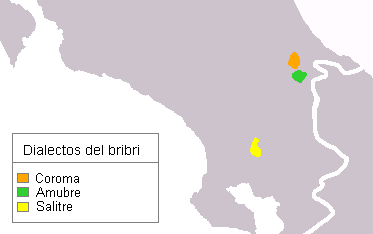 Mapa de los dialectos del idioma bribris.